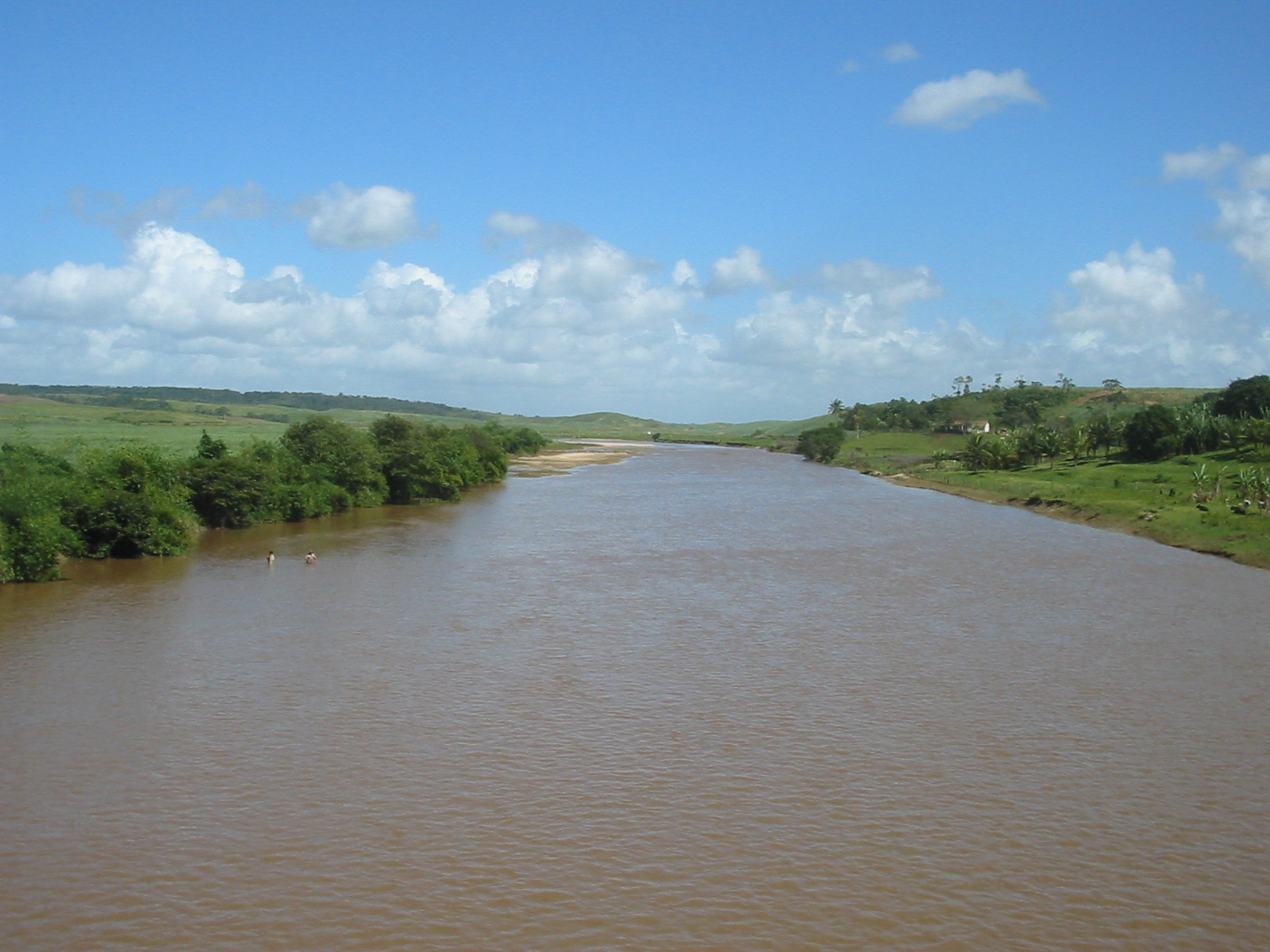 Rio Mamanguape (Paraíba), Brasil. Mamanguape river (Paraíba), Brazil.